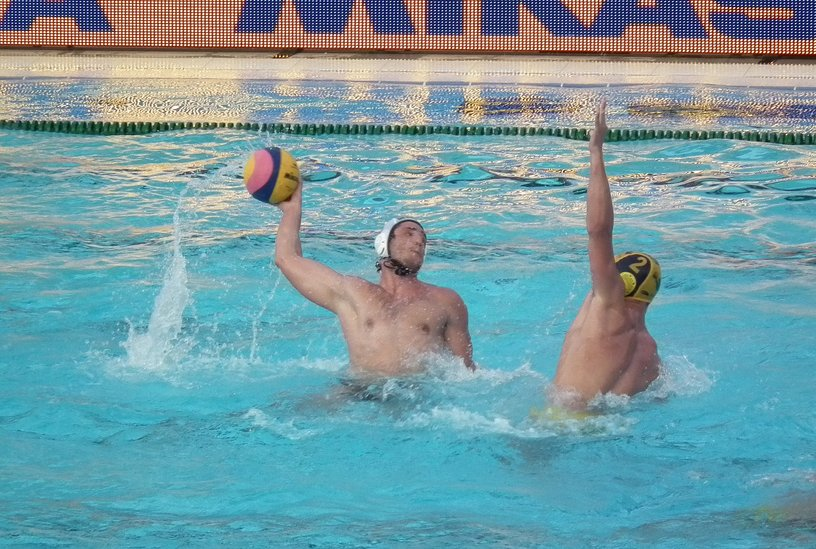 Stefan Mitrović al tiro